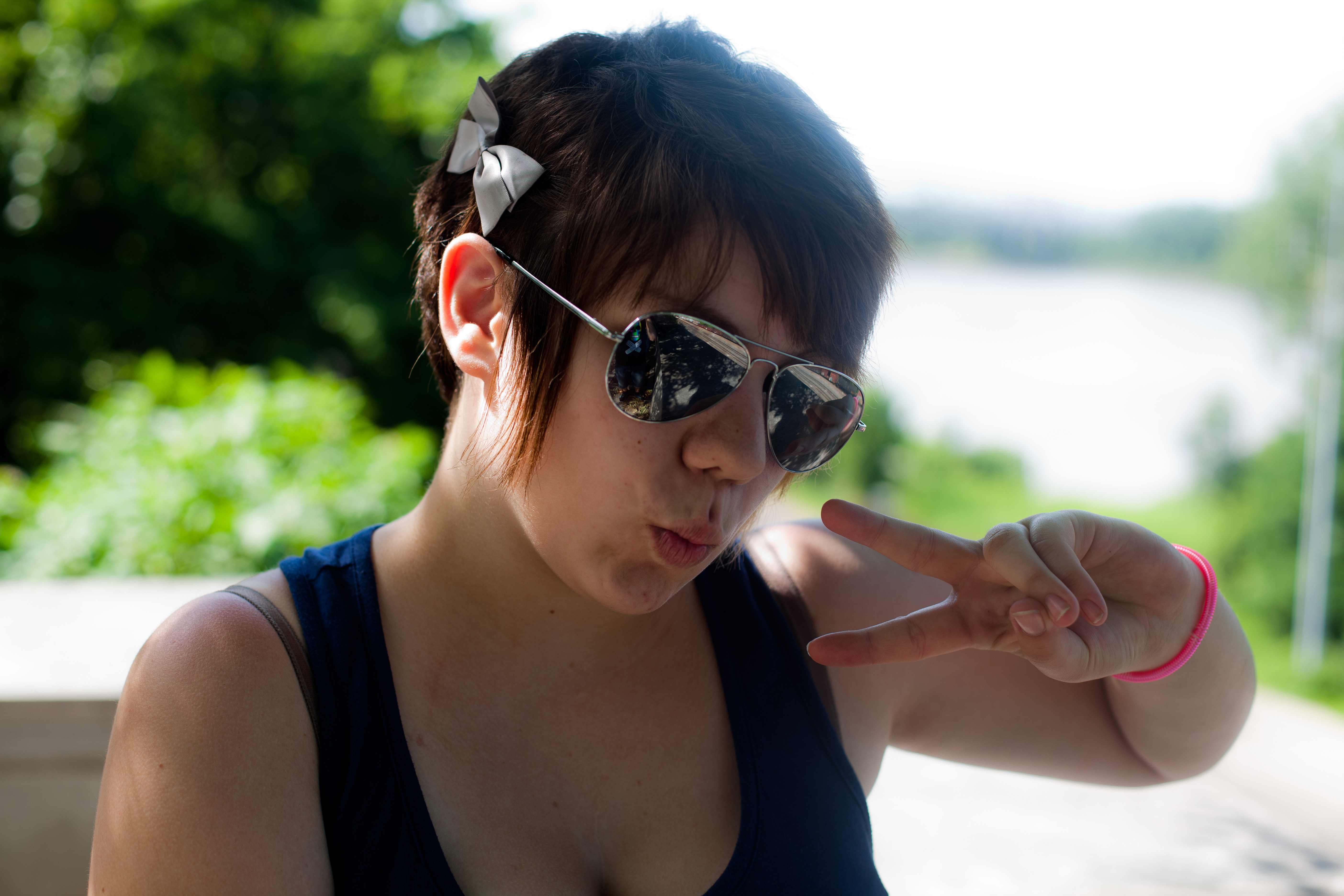 Duckface